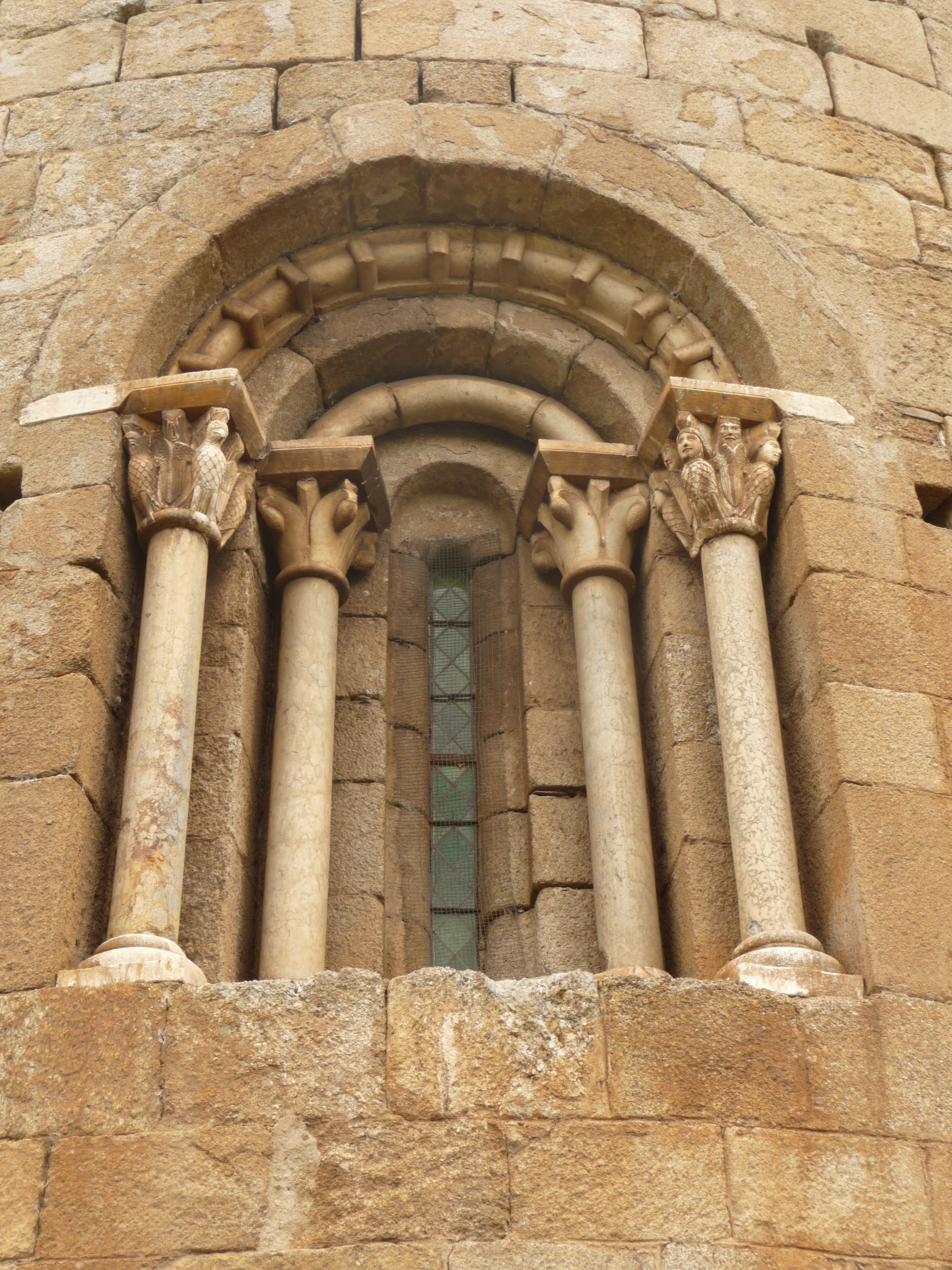 Sant Esteve de Saorra, finestra arquivoltada a l'absis